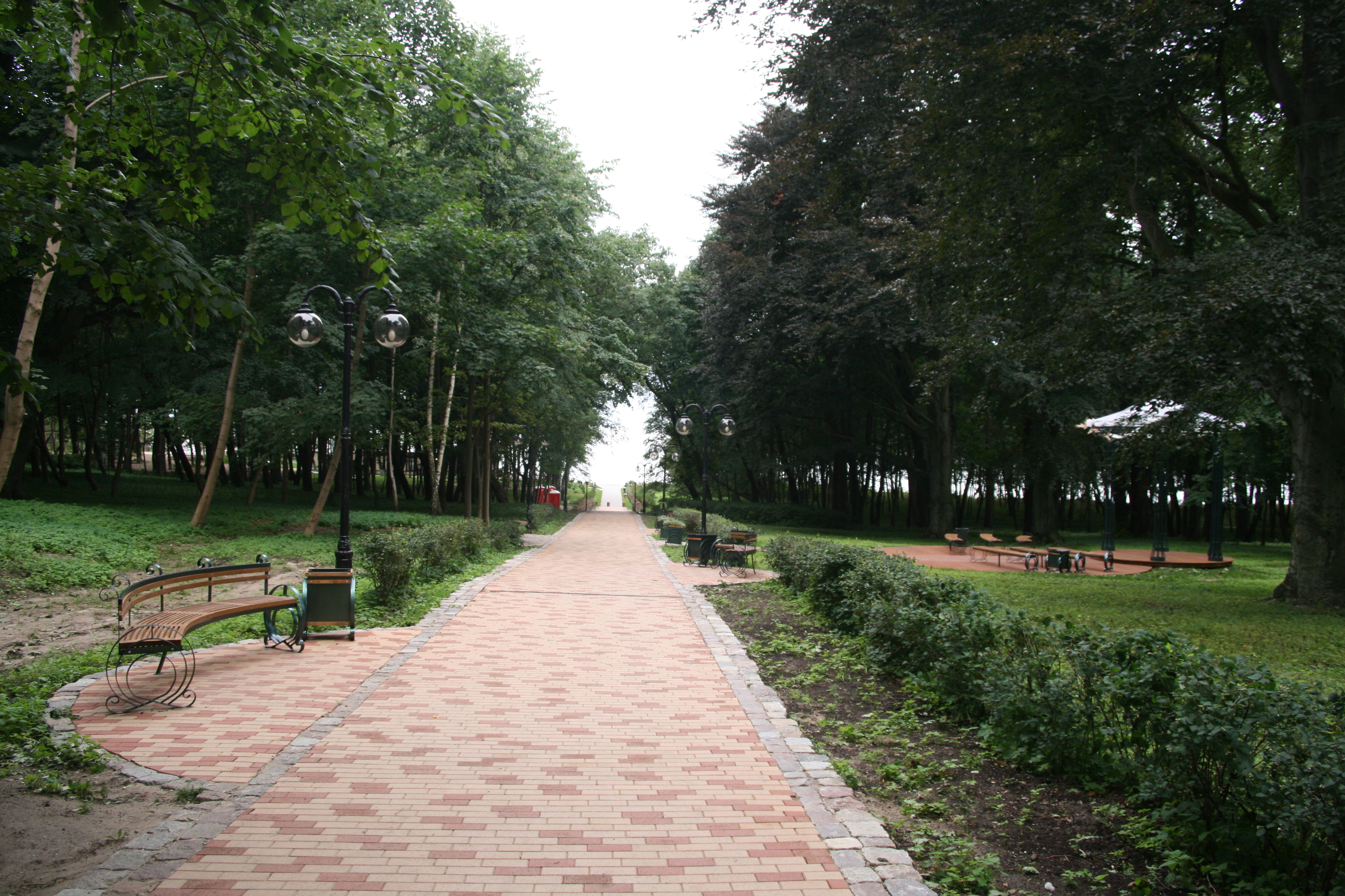 Markus-Bekker-Park in Jantarny / Palmnicken